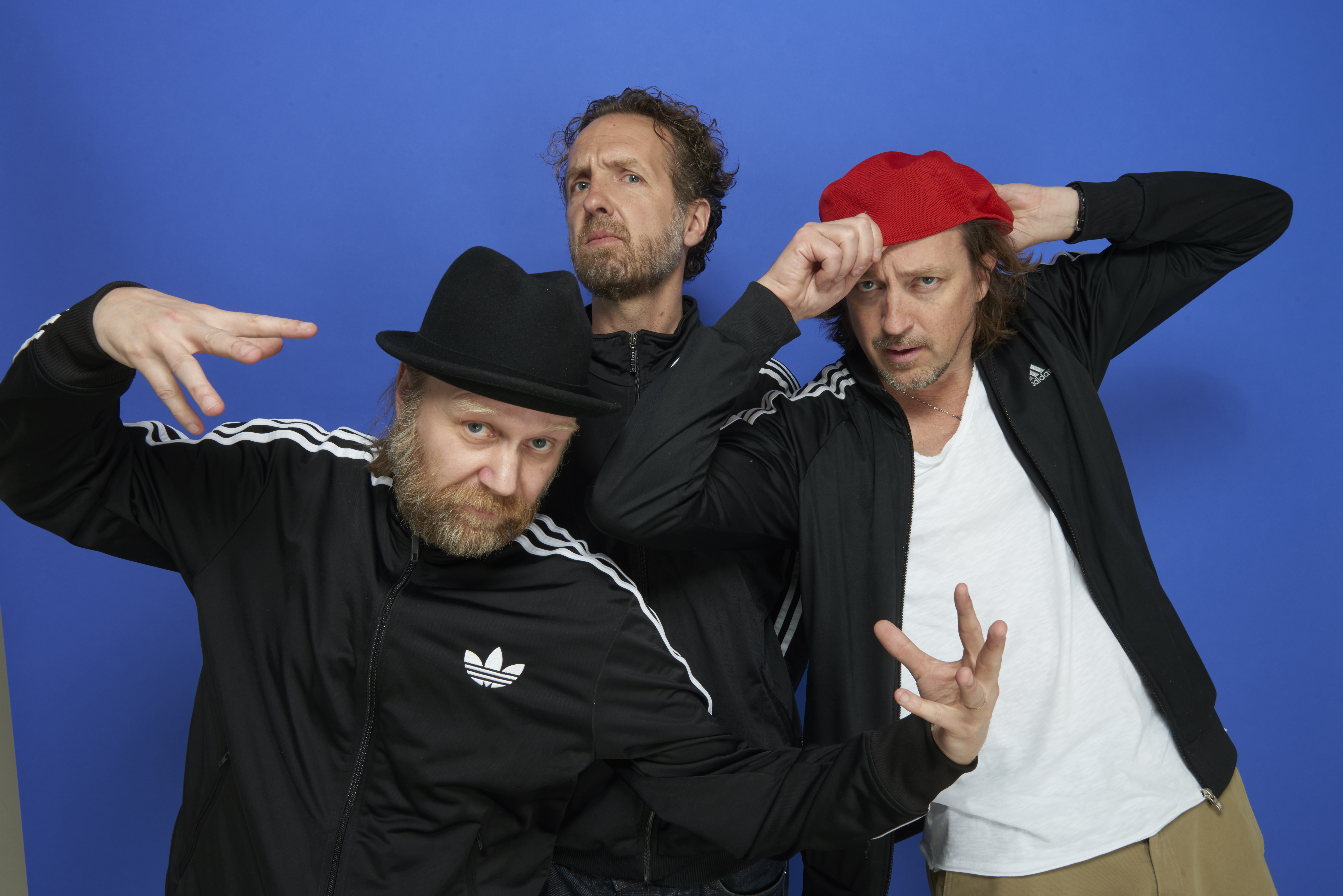 Gruppen JustD